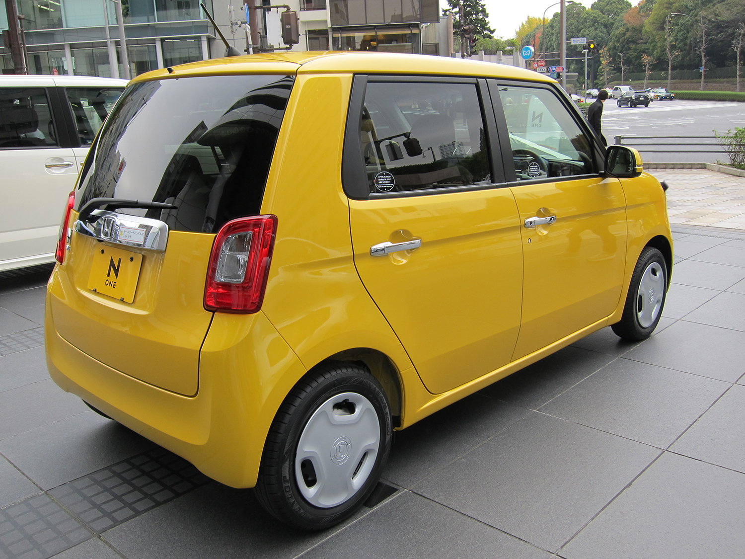 Photo pour article Honda N-One